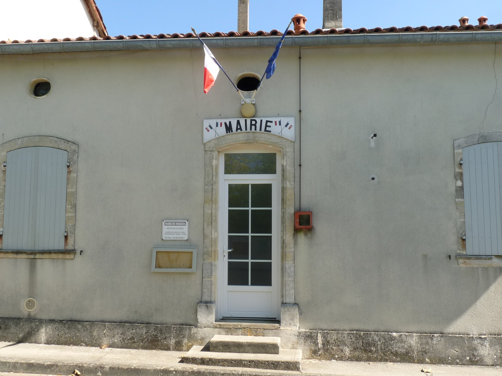 Mairie de Mortiers, Charente-Maritime, France